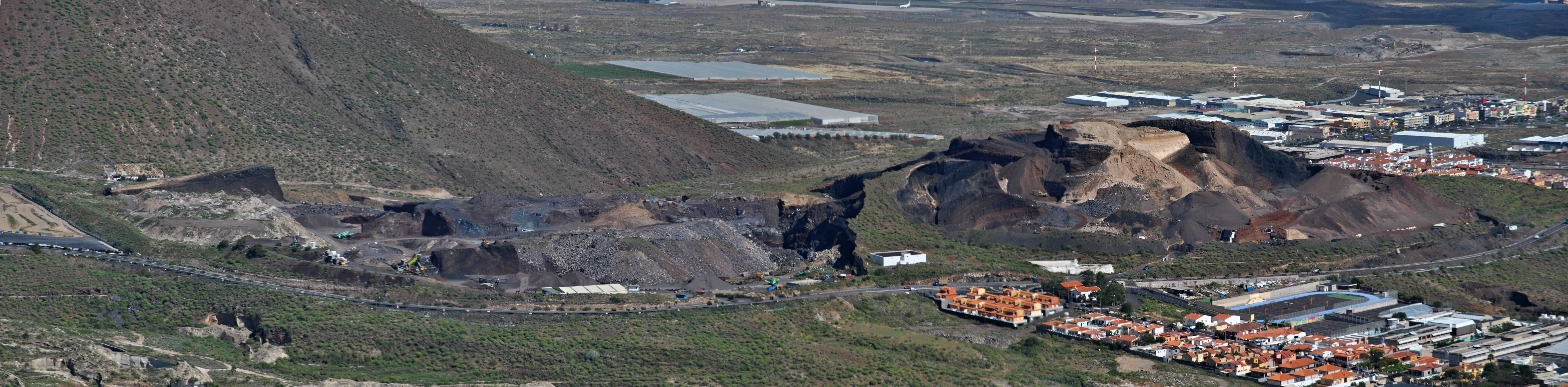 En primer término Aldea Blanca. Detrás Las Chafiras